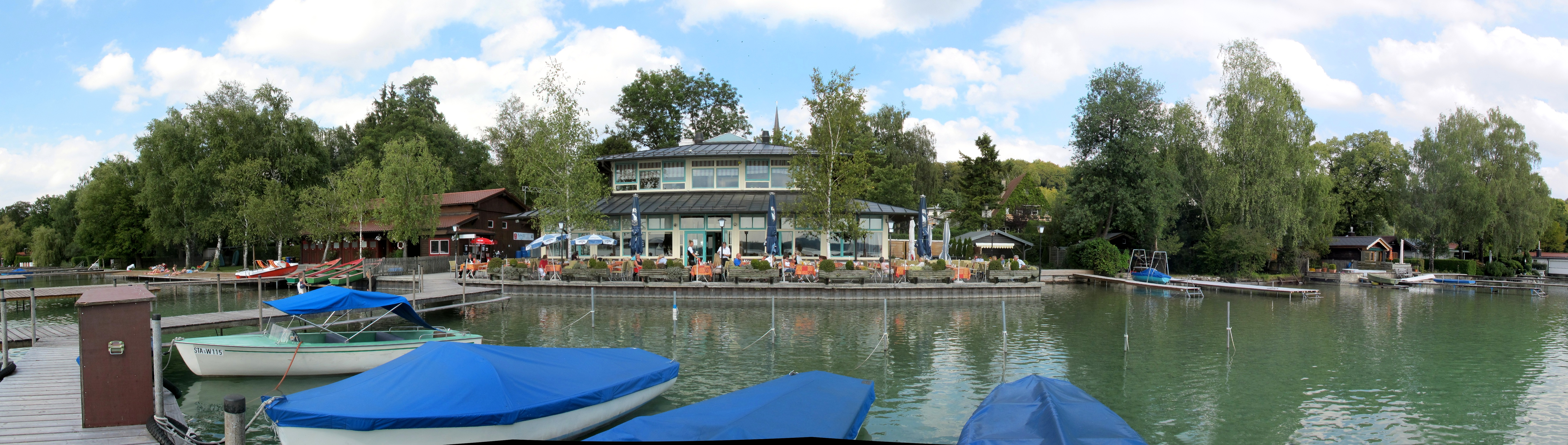 Deutschland, Bayern, Oberbayern, Landkreis Starnberg, Gemeinde Wörthsee, Blick vom Steg auf das Nordufer